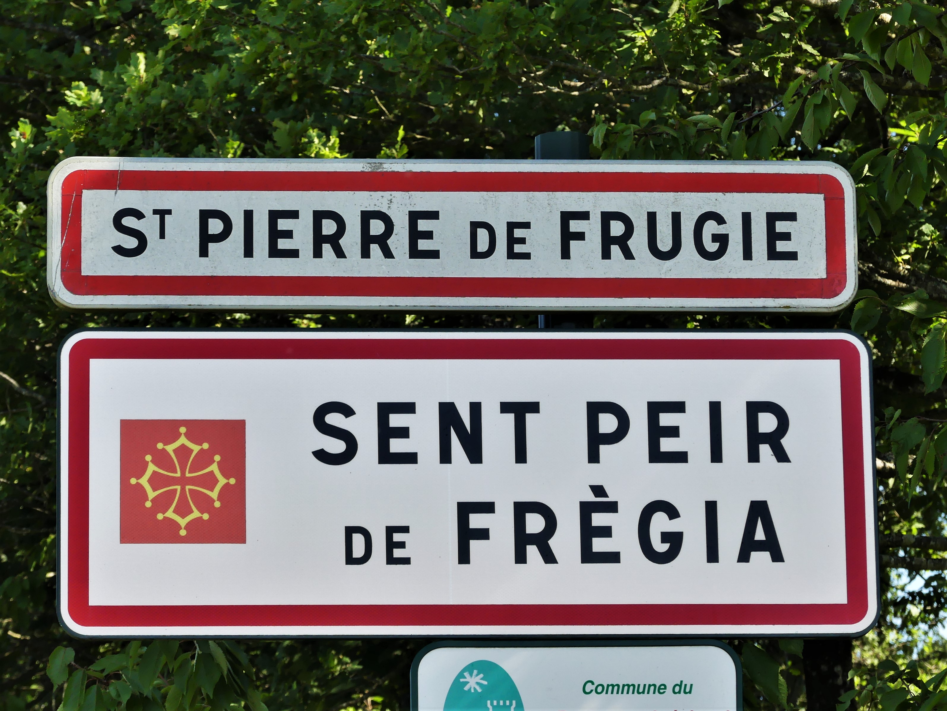 Panneau en français et occitan, Saint-Pierre-de-Frugie, Dordogne, France.